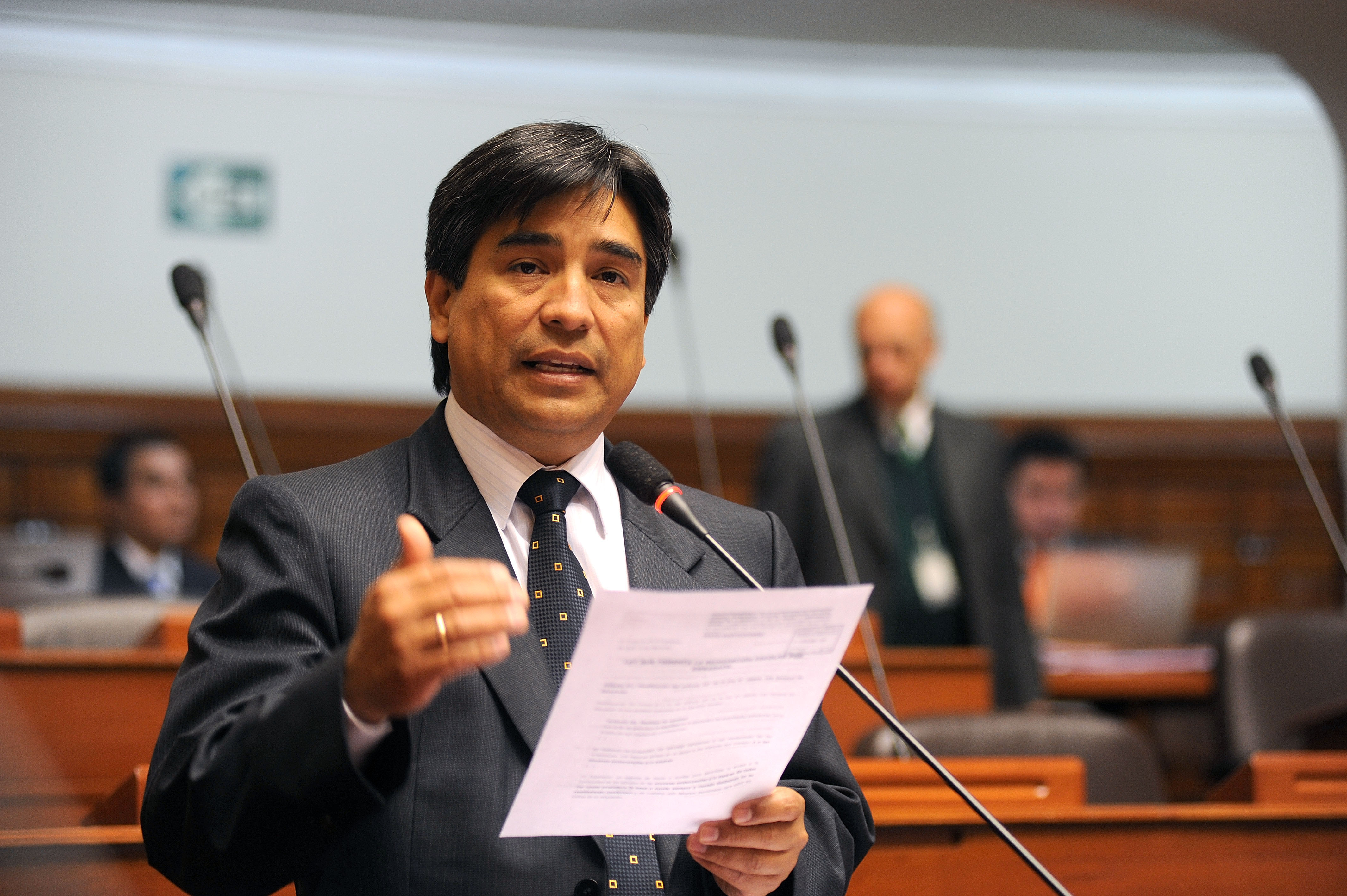 El legislador Luis Wilson fija su posición en el debate parlamentario realizado esta tarde por el Pleno.